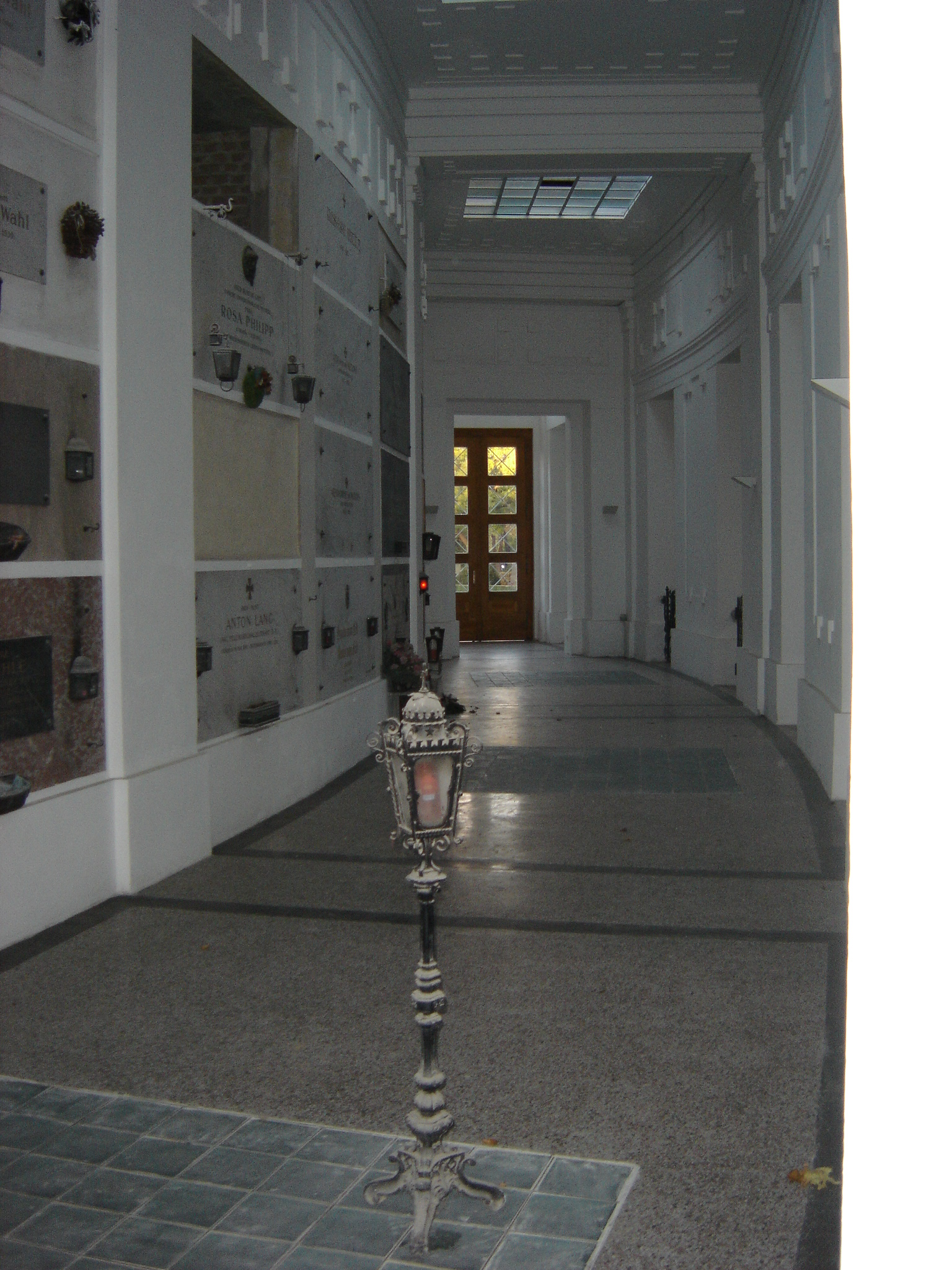 Zentralfriedhof Wien, Neue Arkaden, Erdgeschoss - Innenansicht